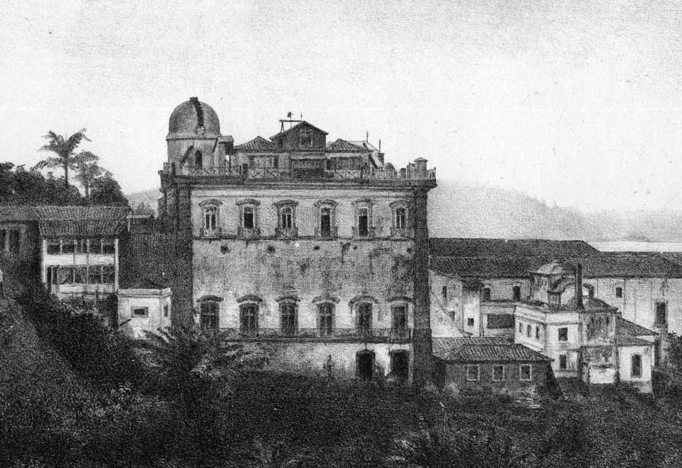 Vista desde el sur del Observatorio Imperial de Río de Janeiro en 1882, Morro do Castelo. (Liais, E. (1882). Annales de L’ Observatoire Impérial de Río de Janeiro. Tome Premier. Description del óbservatoire. Río de Janeiro: Typographie et Lithographie Lombaerts & Cia, Pl. III. Biblioteca OAC. Digitalizado S. Paolantonio).